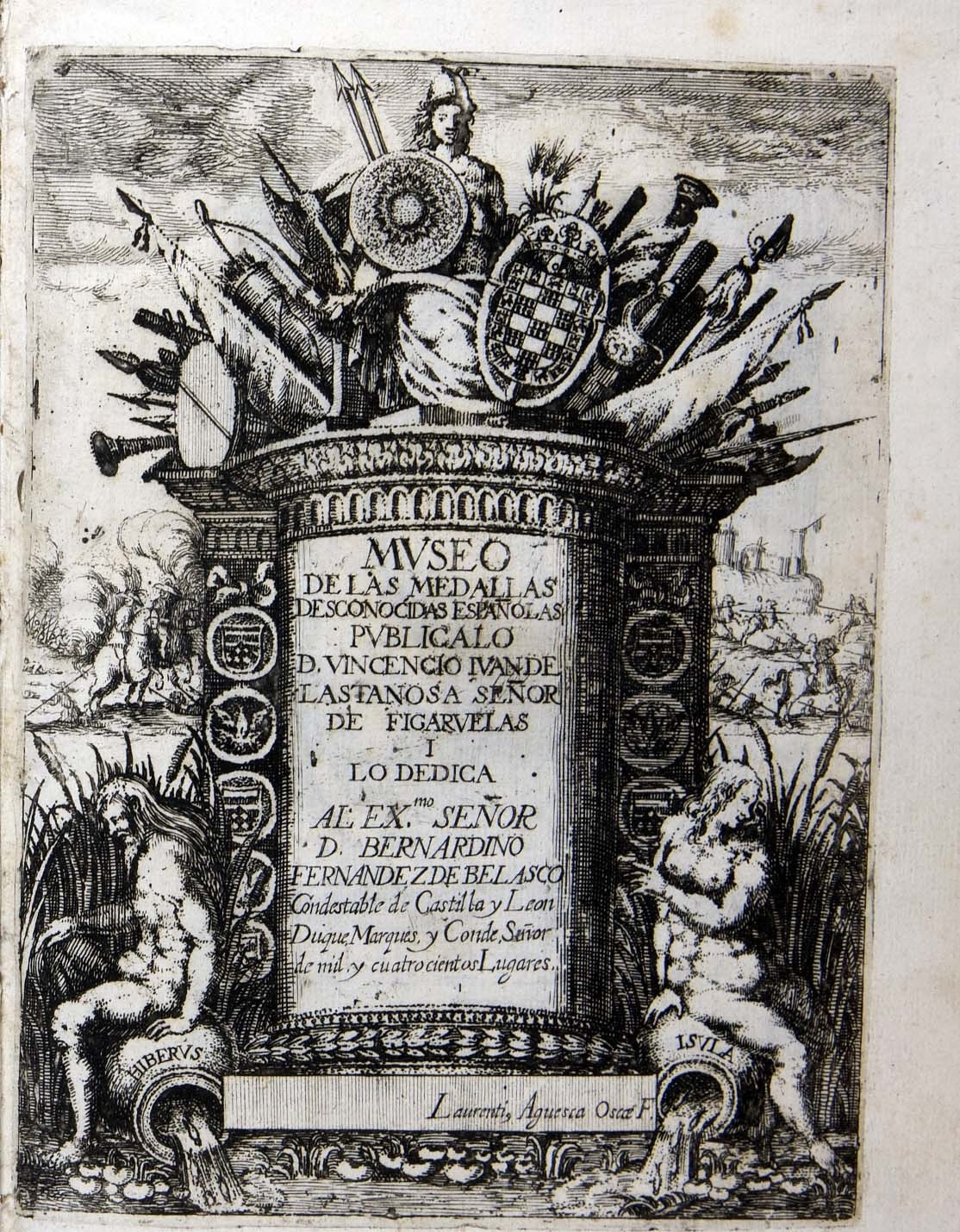 Portada calcográfica del tratado de Vincencio Juan de Lastanosa, Museo de medallas desconocidas españolas, Huesca, 1645